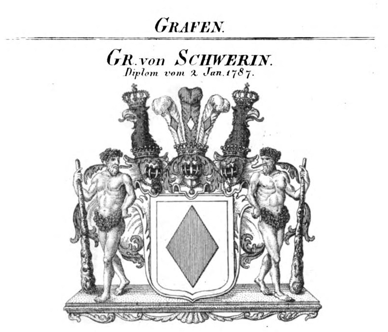 Wappen Schwerin 3 - Tyroff HA.jpg